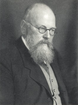 Porträt des Malers Leopold von Kalckreuth.